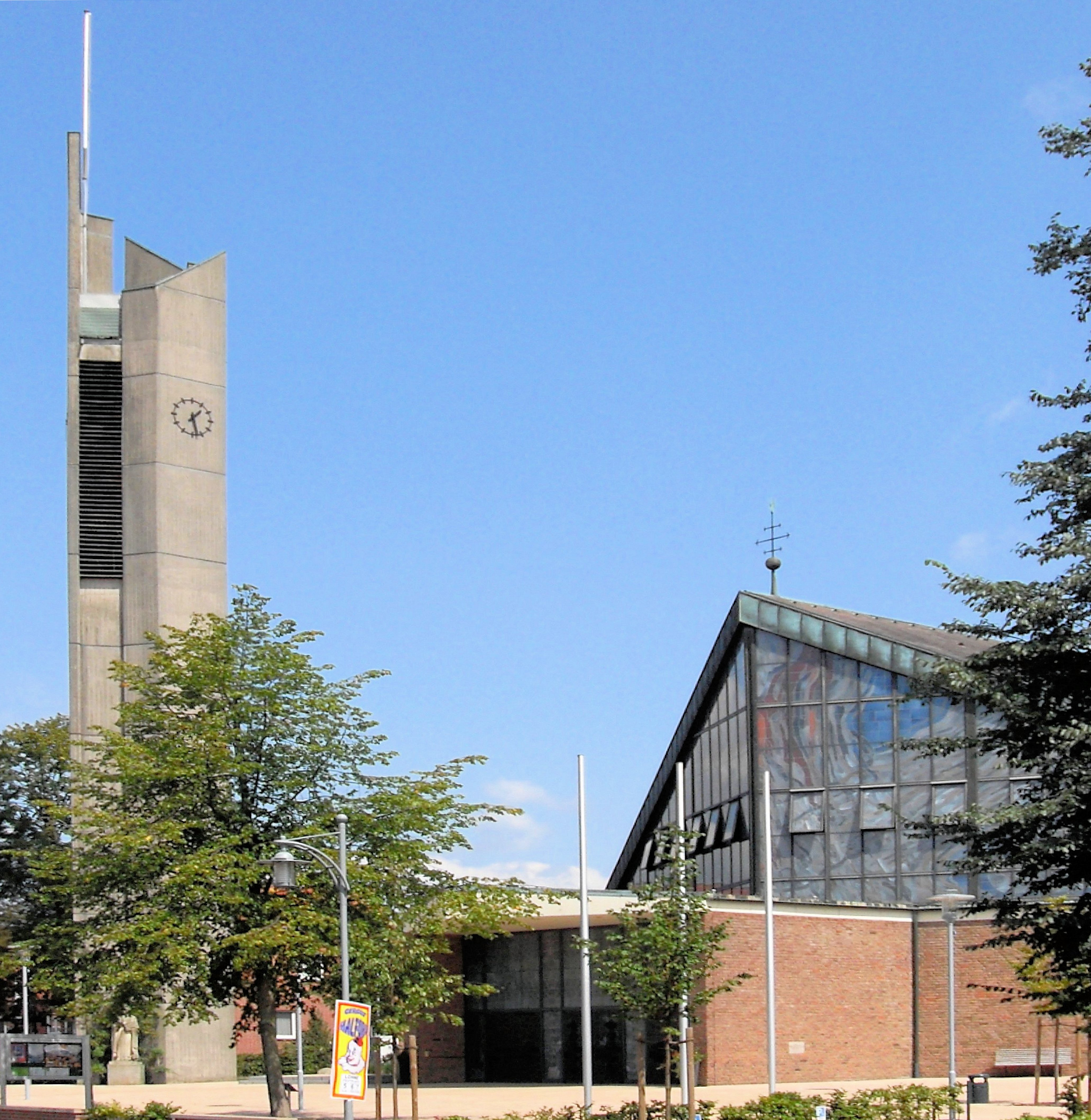 Kirche St. Antonius in Lohne, Gemeinde Wietmarschen, Landkreis Grafschaft Bentheim